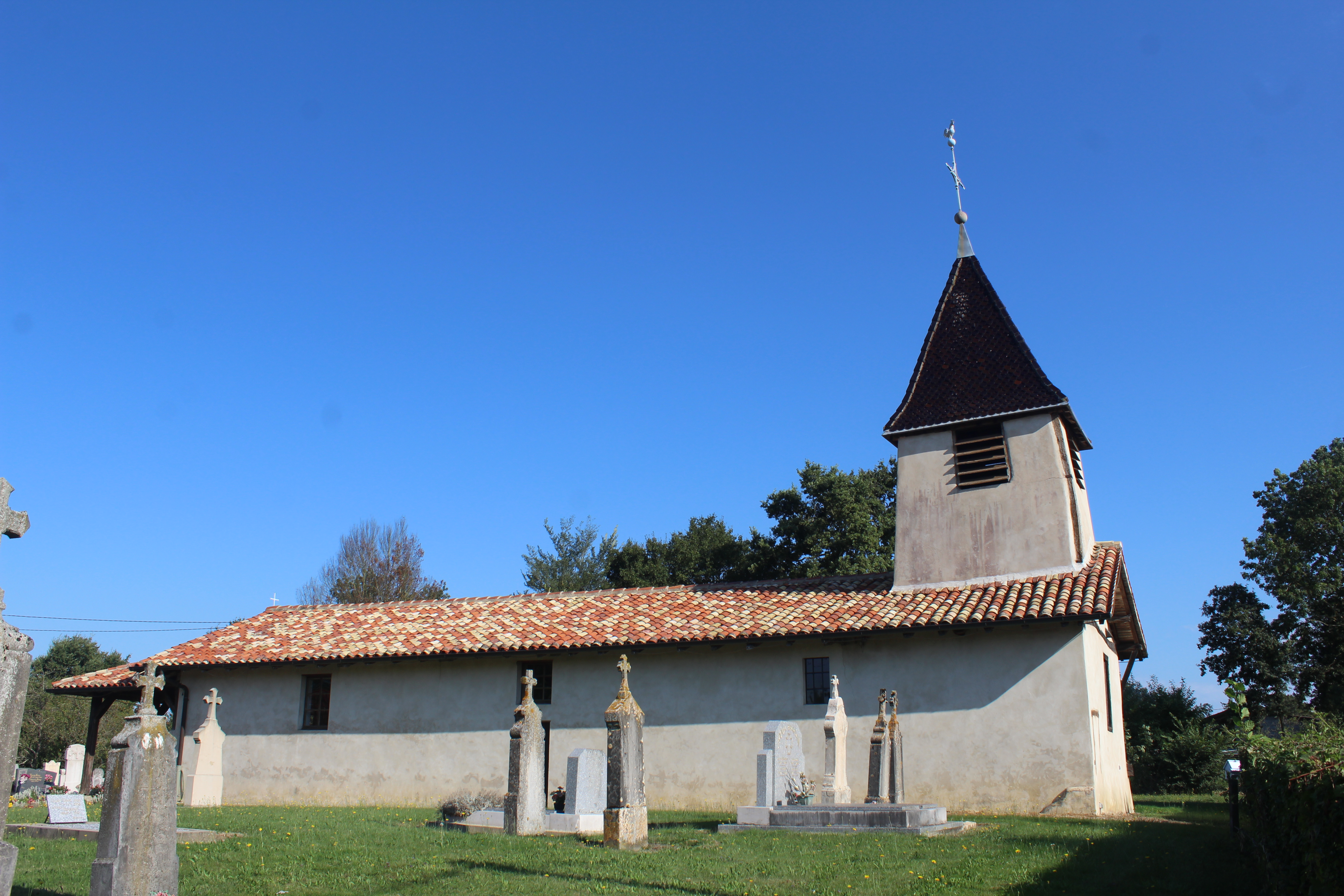 Église de Saint-Sulpice dans l'Ain.